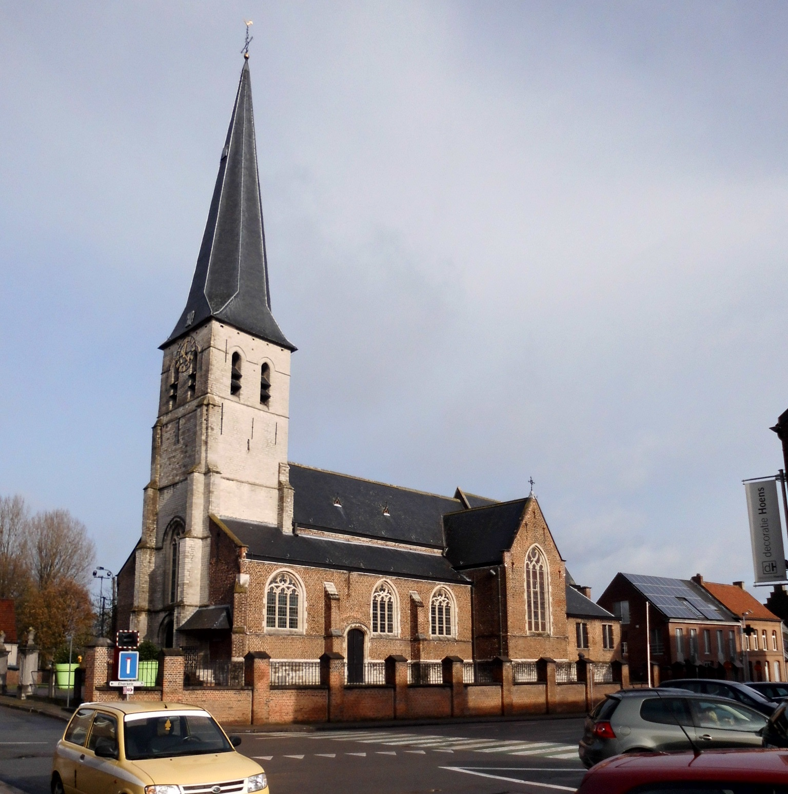 Sint-Margaretakerk - Dorpstraat - Elversele - Temse - Oost-Vlaanderen - België